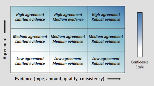 Matrixdarstellung der Aussagekraft (Confidence) eines Ergebnisses abhängig von Übereinstimmung (Zeilen bzw. y-Achse) und Güte des Ergebnisses (Spalen bzw. x-Achse). Je blauer/dunkler die Schattierung desto höher die Aussagekraft.